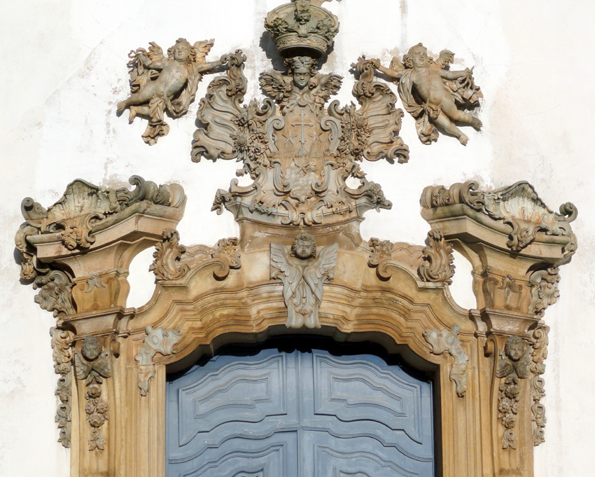 Igreja de Nossa Senhora do Carmo